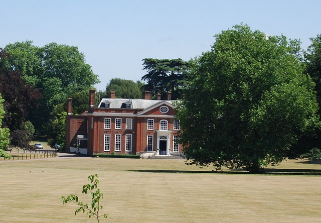 An 18th century Grade I listed country House . Open to the public and organises functions.